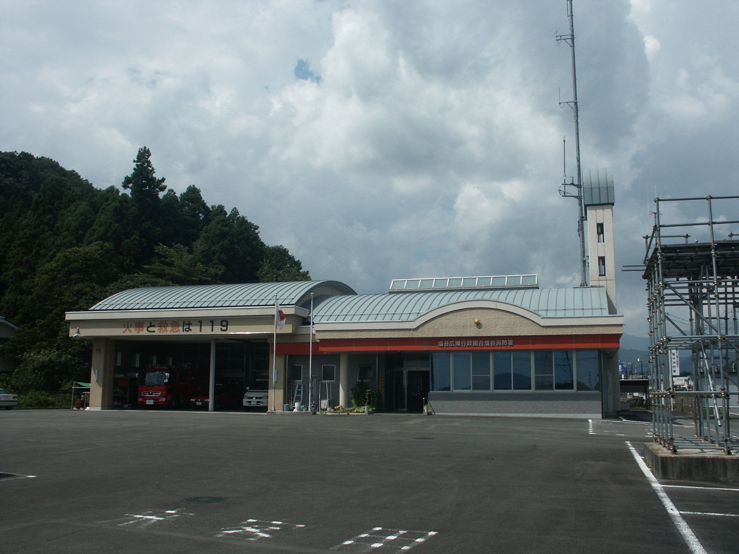 塩谷広域行政組合消防本部塩谷消防署庁舎